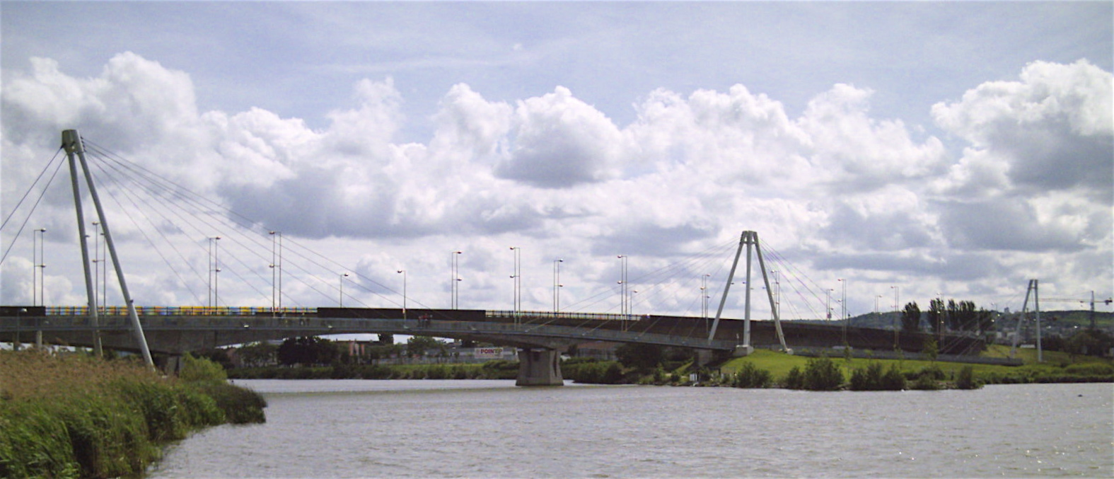 La meurthe à Nancy Passerelle de la Méchelle, jouxtant le pont de la Concorde reliant Nancy à Tomblaine.